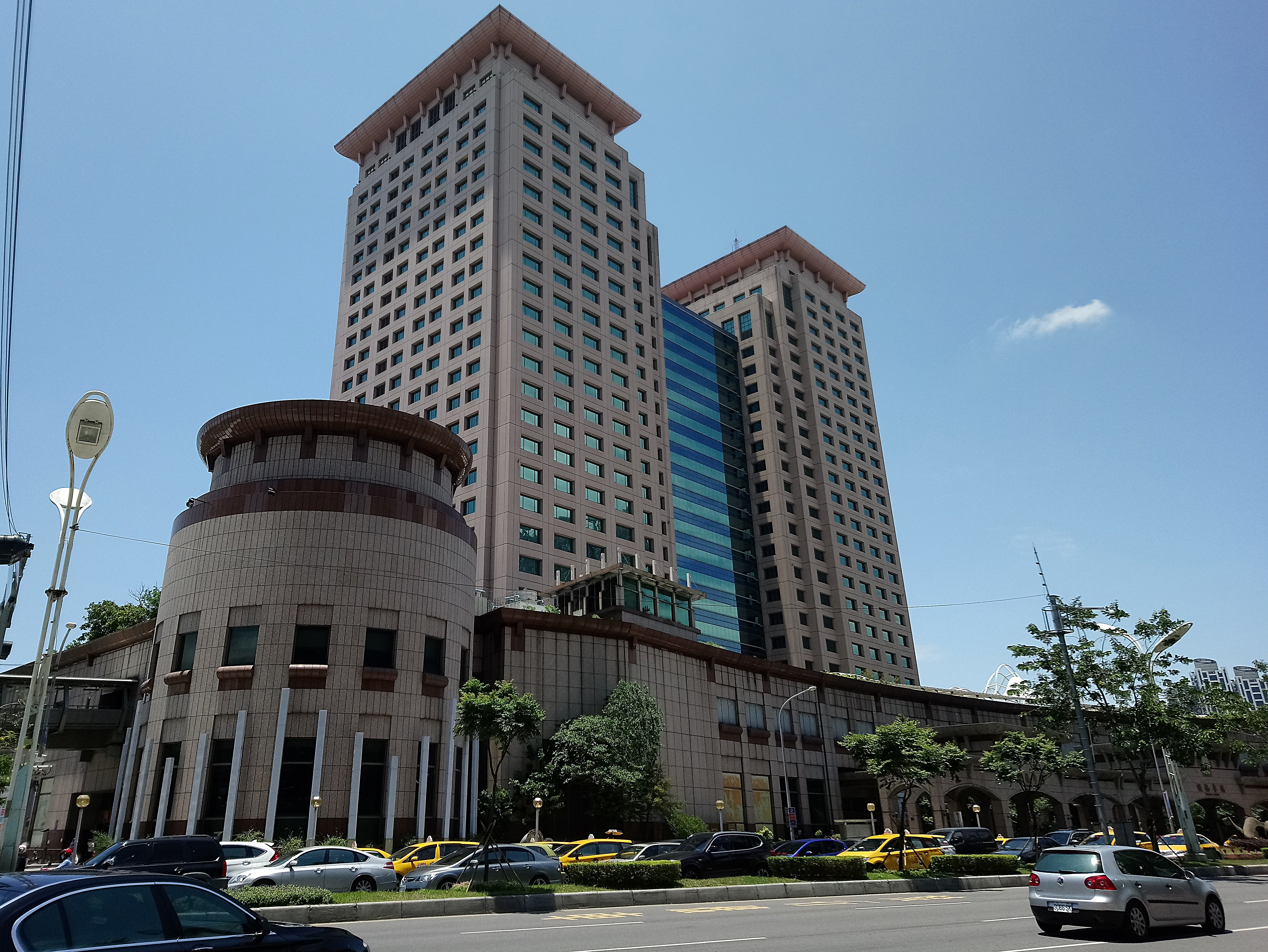 臺鐵板橋車站大樓,新北市板橋區新埔聯合里新民里